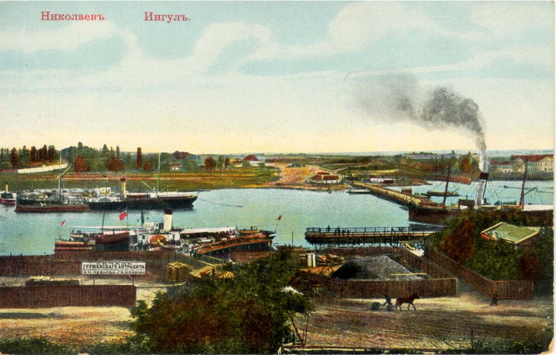 «Николаевъ. Ингулъ.»